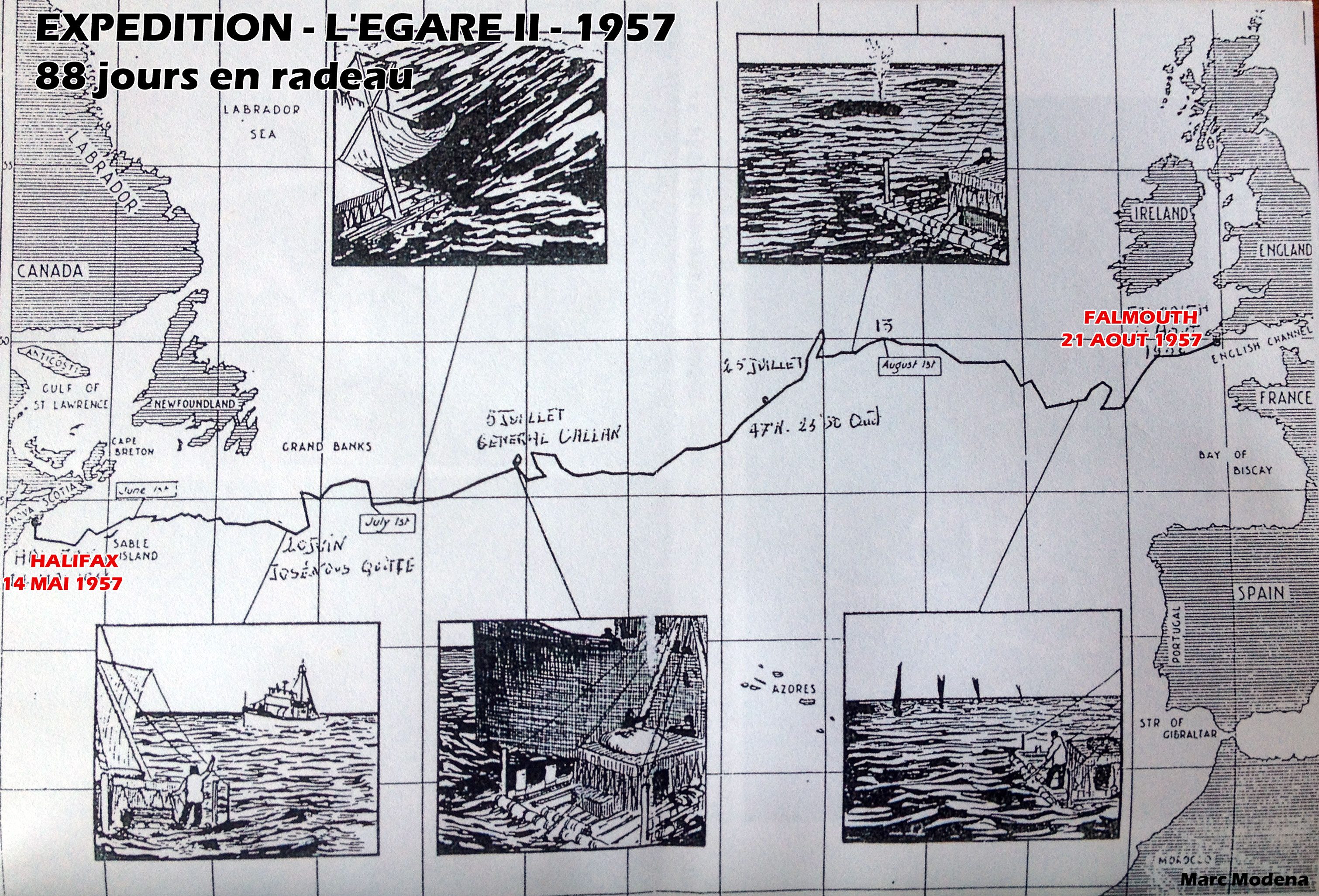 Carte de l'Expedition L'Egaré II